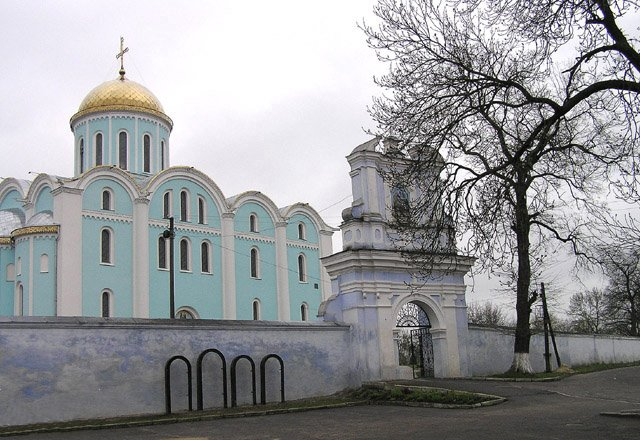 Успенский собор во Владимире Волынском